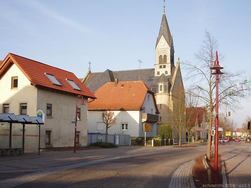 Hauptstraße von Bad Rappenau-Obbergimpern mit der katholischen Kirche